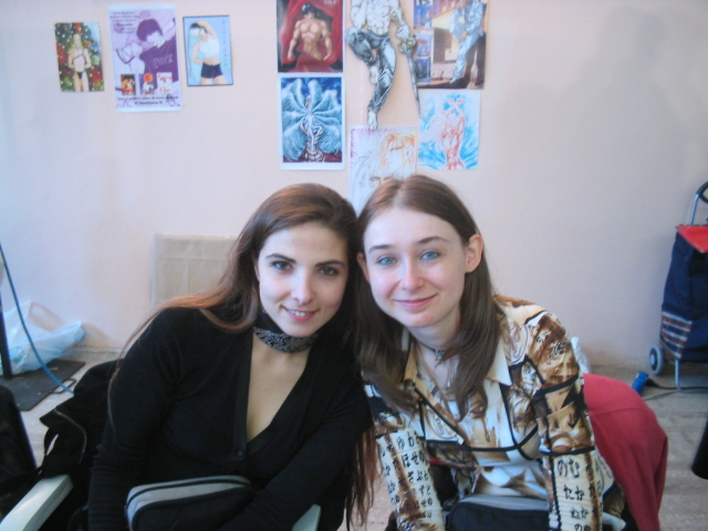 Le Peruggine al Romics 2004 tenutosi a Roma.